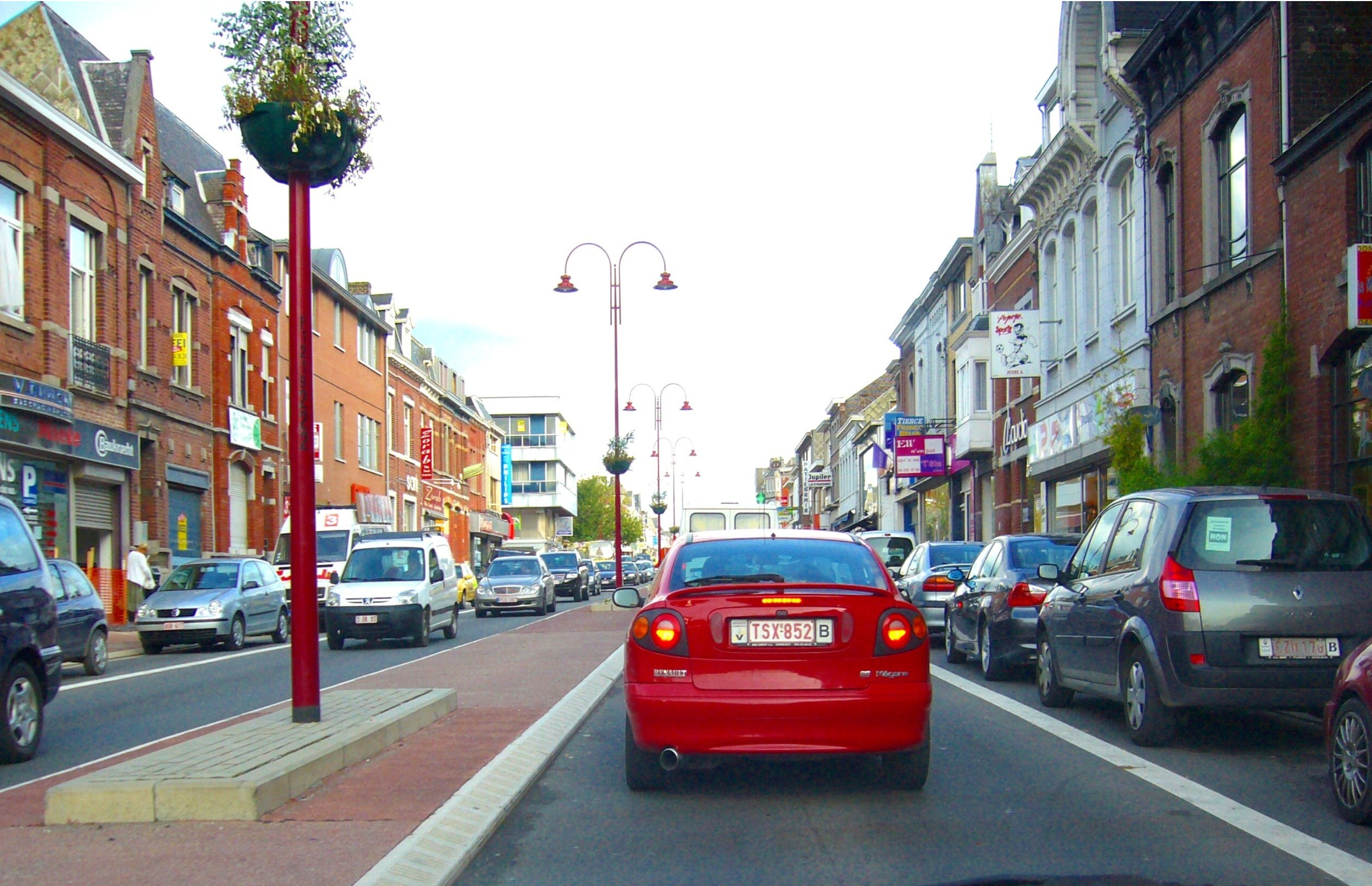 La nationale 3 et ses nombreux commerces, photo personnelle.